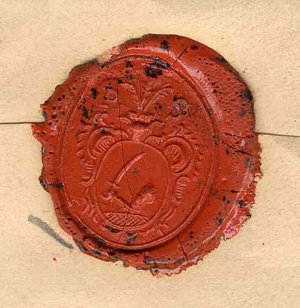 id. nemes Persay Sándor viaszpecsétje a végrendeletén